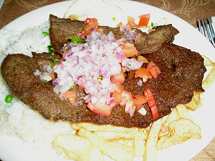 Plato de silpancho cochabambino.